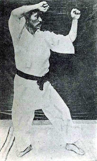 Gichin Funakoshi realizando el primer movimiento de Heian Nidan